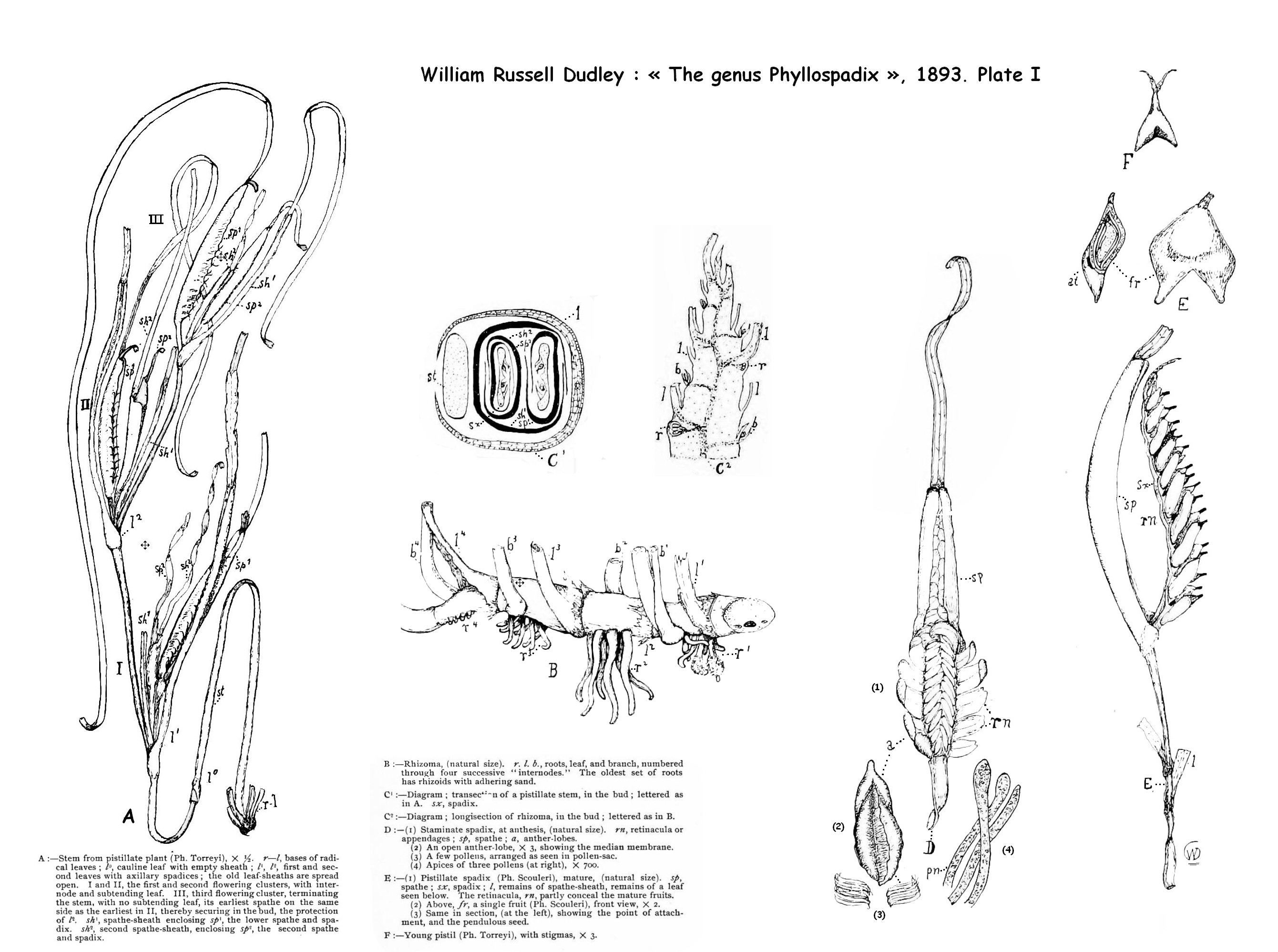 Plante avec inflorescences mâles de Phyllospadix torreyi S.Watson